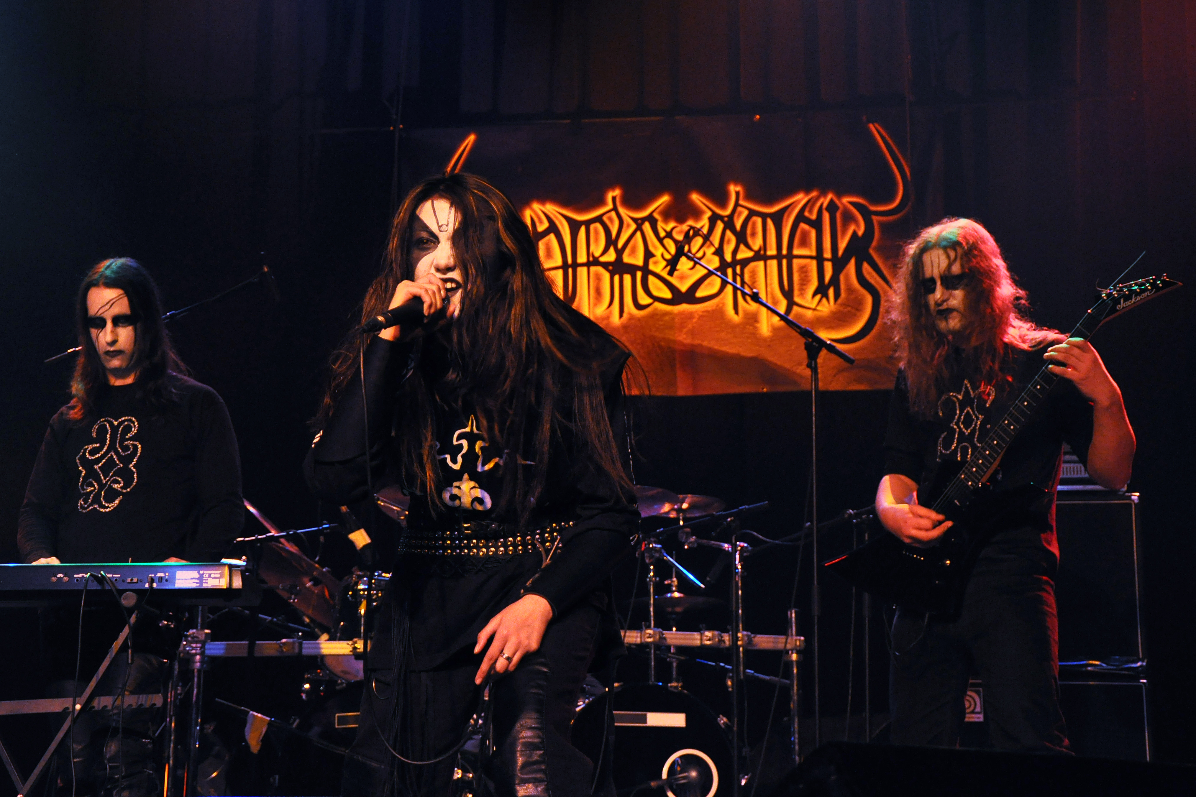 Darkestrah au Crosne Medieval Fest, à Crosne, le 14 Novembre 2009. Darkestrah est un groupe de Black Metal originaire du Kirghizistan et actuellement installé en Allemagne.